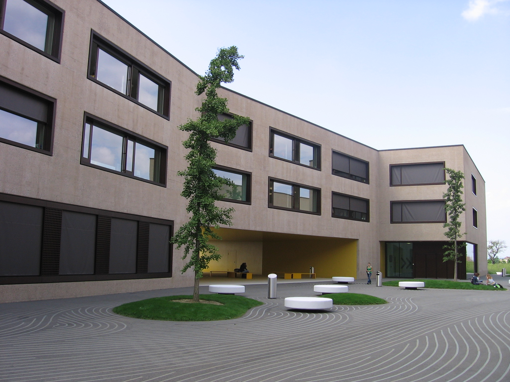 Gymnase Intercantonal de la Broye